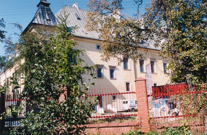 Zamek Myszkowskich w Spytkowicach. Zdjęcie wykonane przez MichałaKa późną wiosną 2000 r.